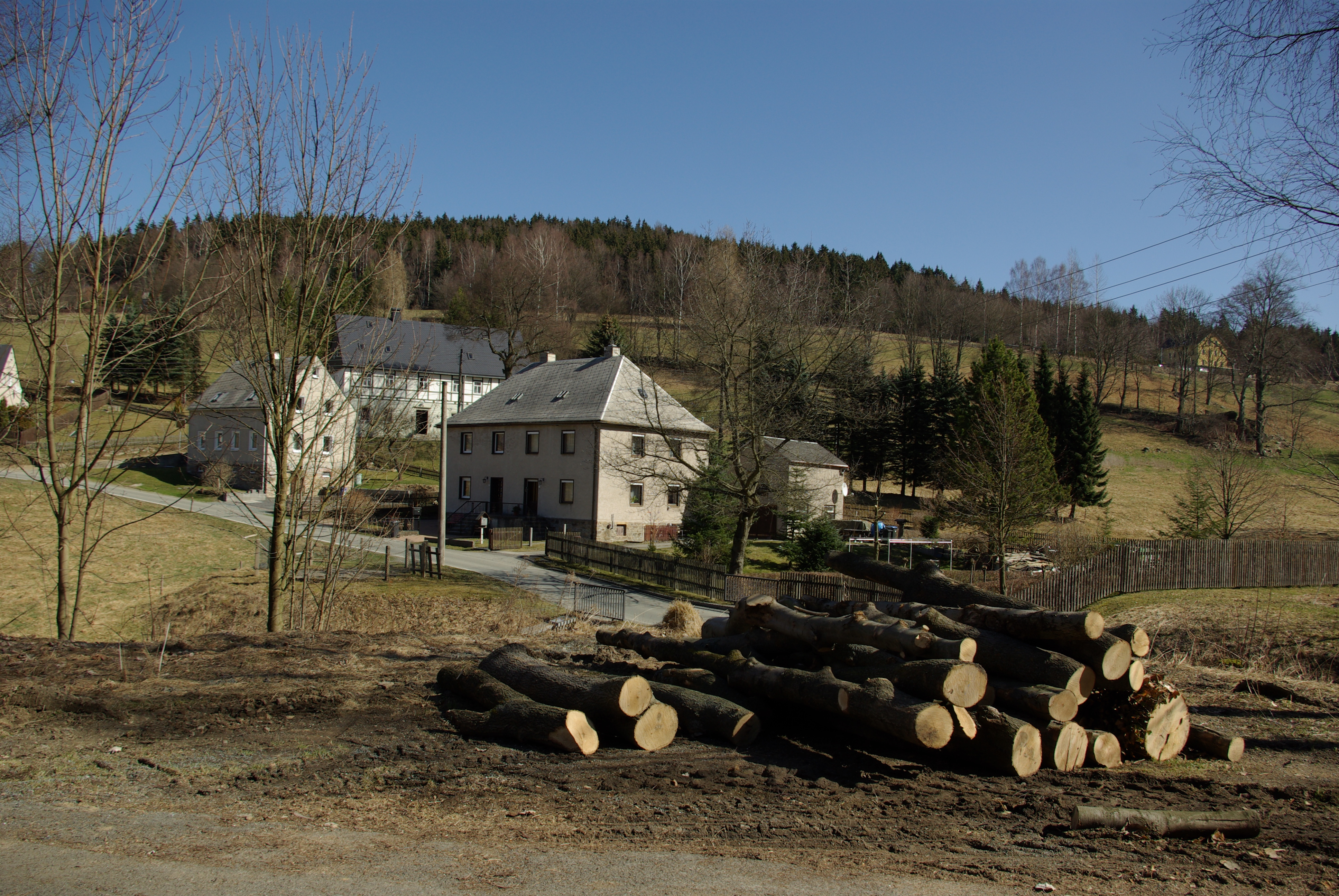 Schindelbach